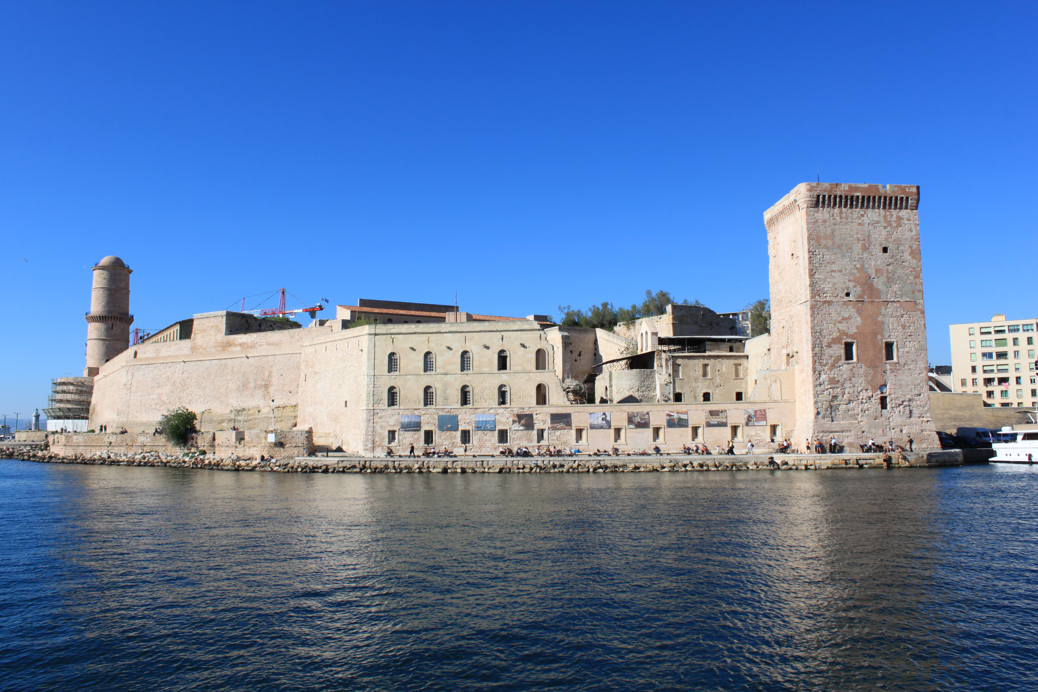 Eglise Saint-Laurent, Marseille, FRANCE